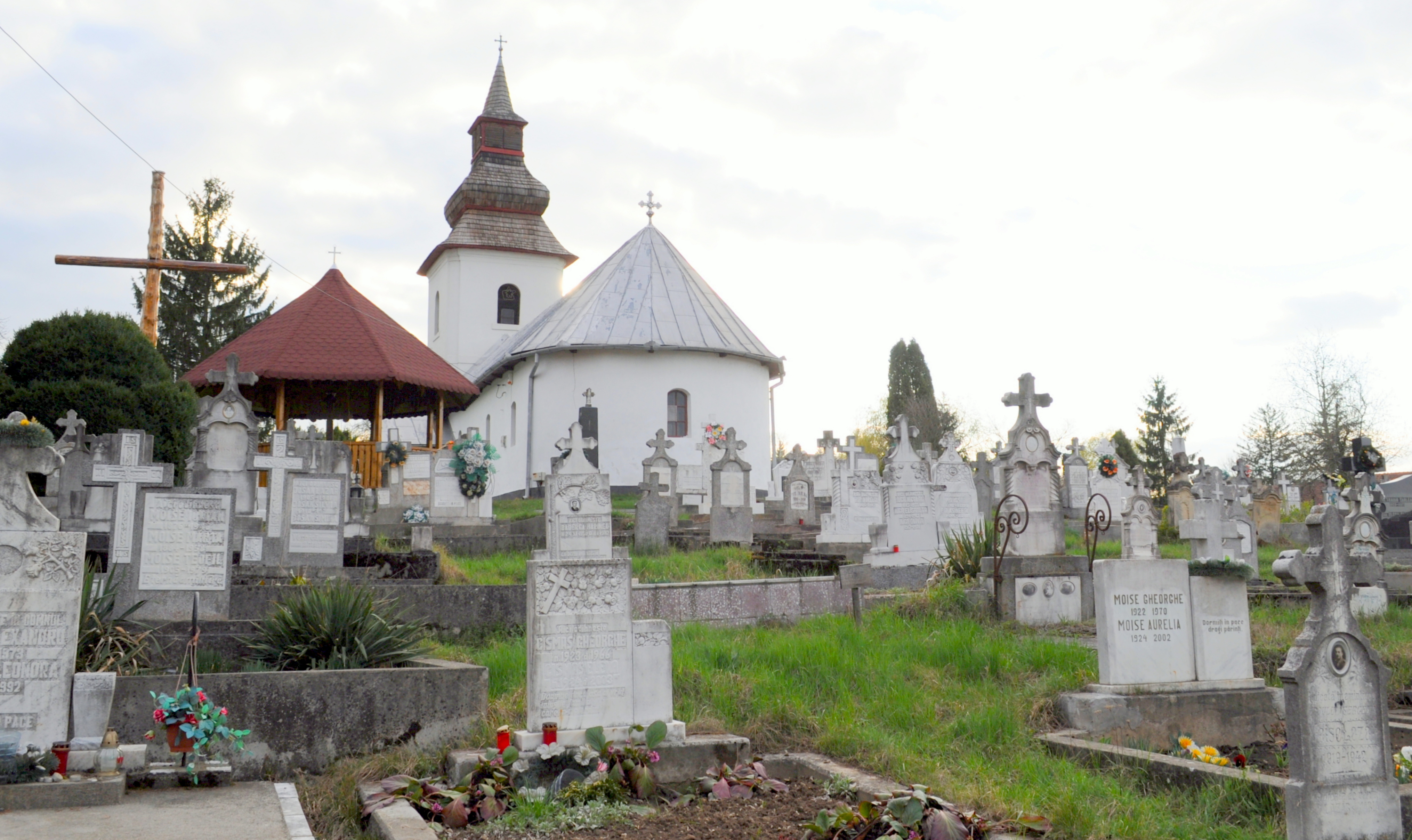 Biserica "Cuvioasa Paraschiva", sat LĂPUŞNIC; comuna DOBRA